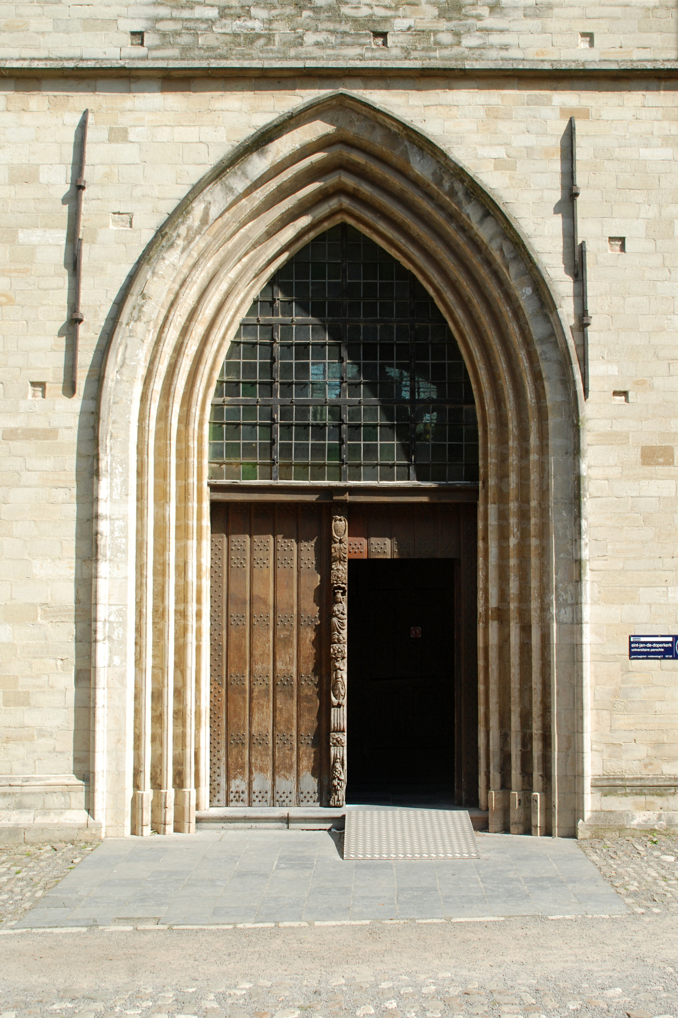 Belgique - Louvain - Église Saint-Jean-Baptiste-du-Béguinage - portail